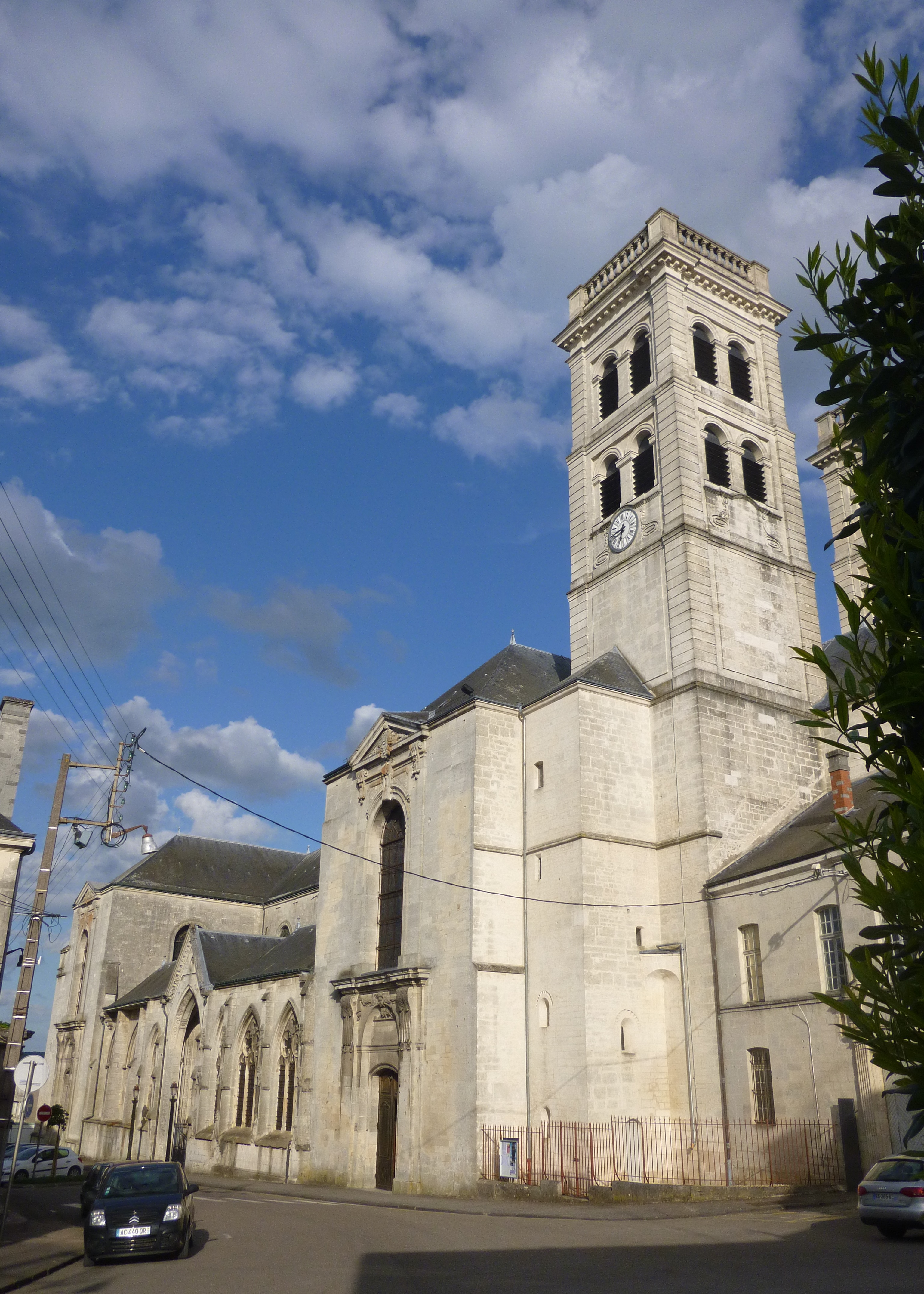 Vue générale de la façade sur rue de la cathédrale de Verdun, avec les deux transepts et la nef collatérale.